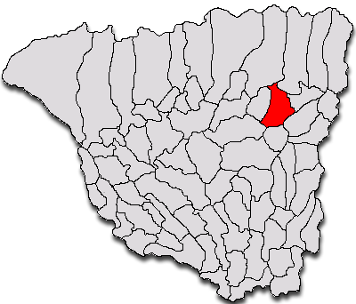 Categorie:Hărţi ale judeţului Gorj